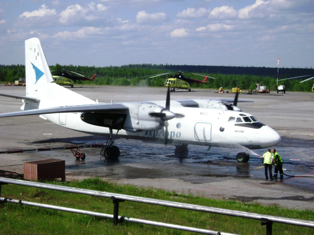 запуск двигателей в условиях высоких температур самолета Ан-24 в аэропорту Усть-Кут